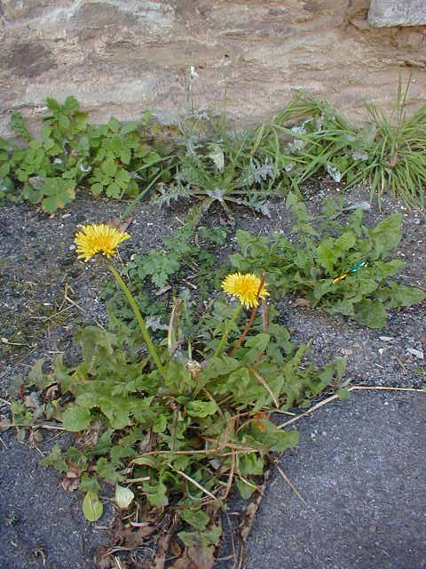 common dandelion (flawers) Walon: såvadje cécoreye avou ses fleurs k' on lome cobén florin, ki crexhe so les graevetes. (portrait saetchî pa L. Mahin).